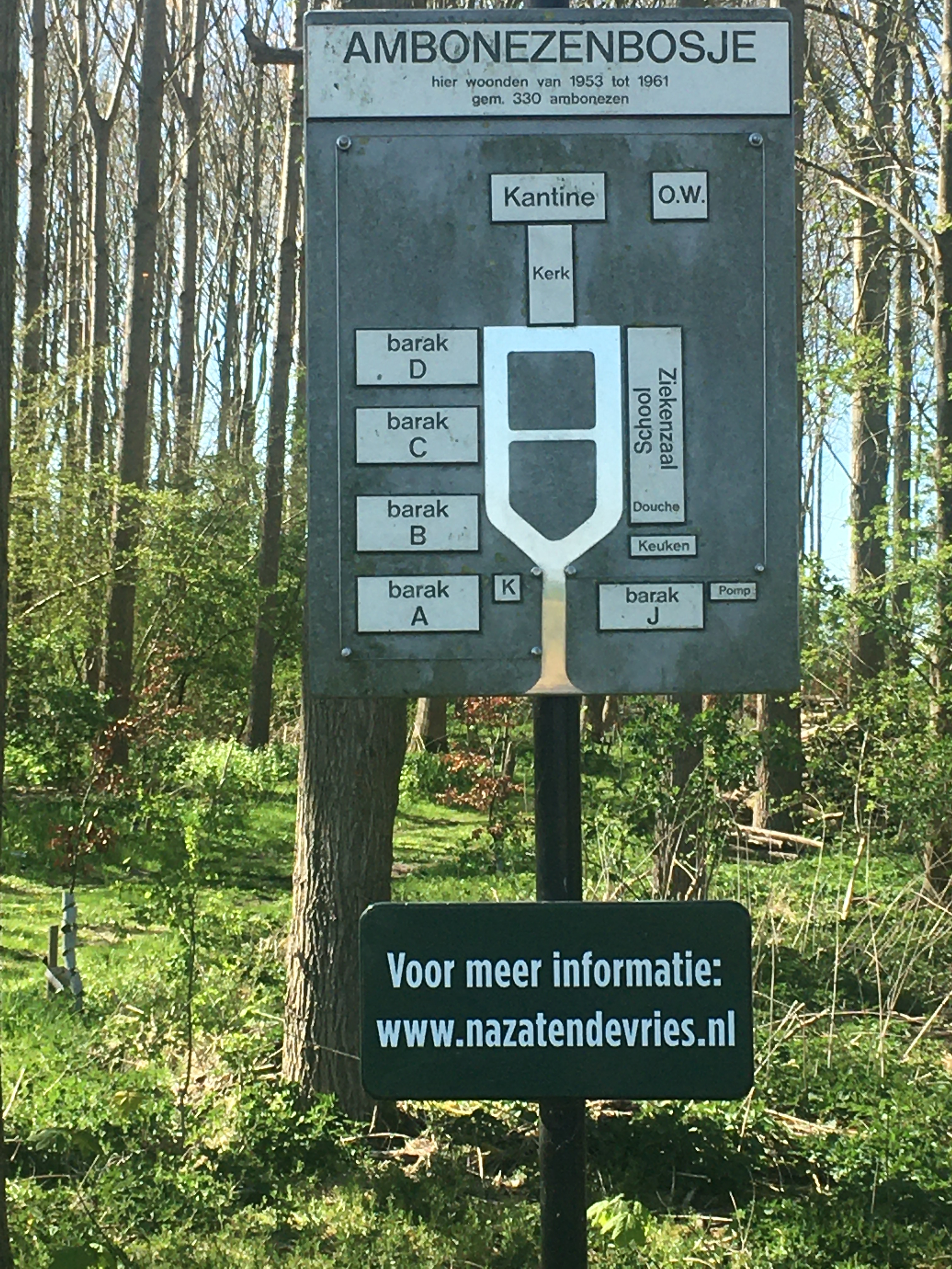 Plattegrond van het voormalige kamp voor Ambonezen in de Carel Coenraadpolder. april 2020